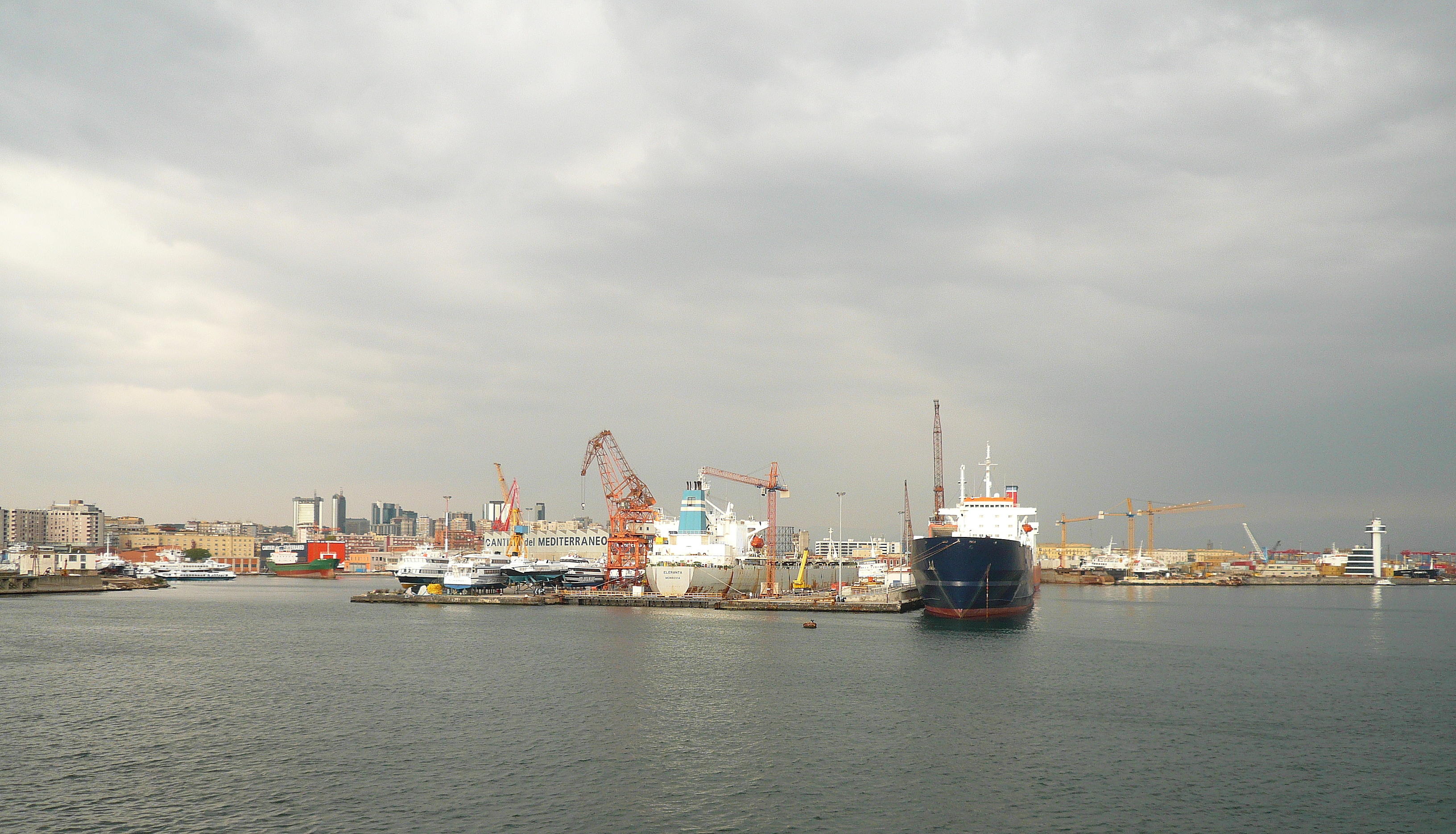 cantiere navale nel porto di Napoli. Autore foto: Roberto De Martino